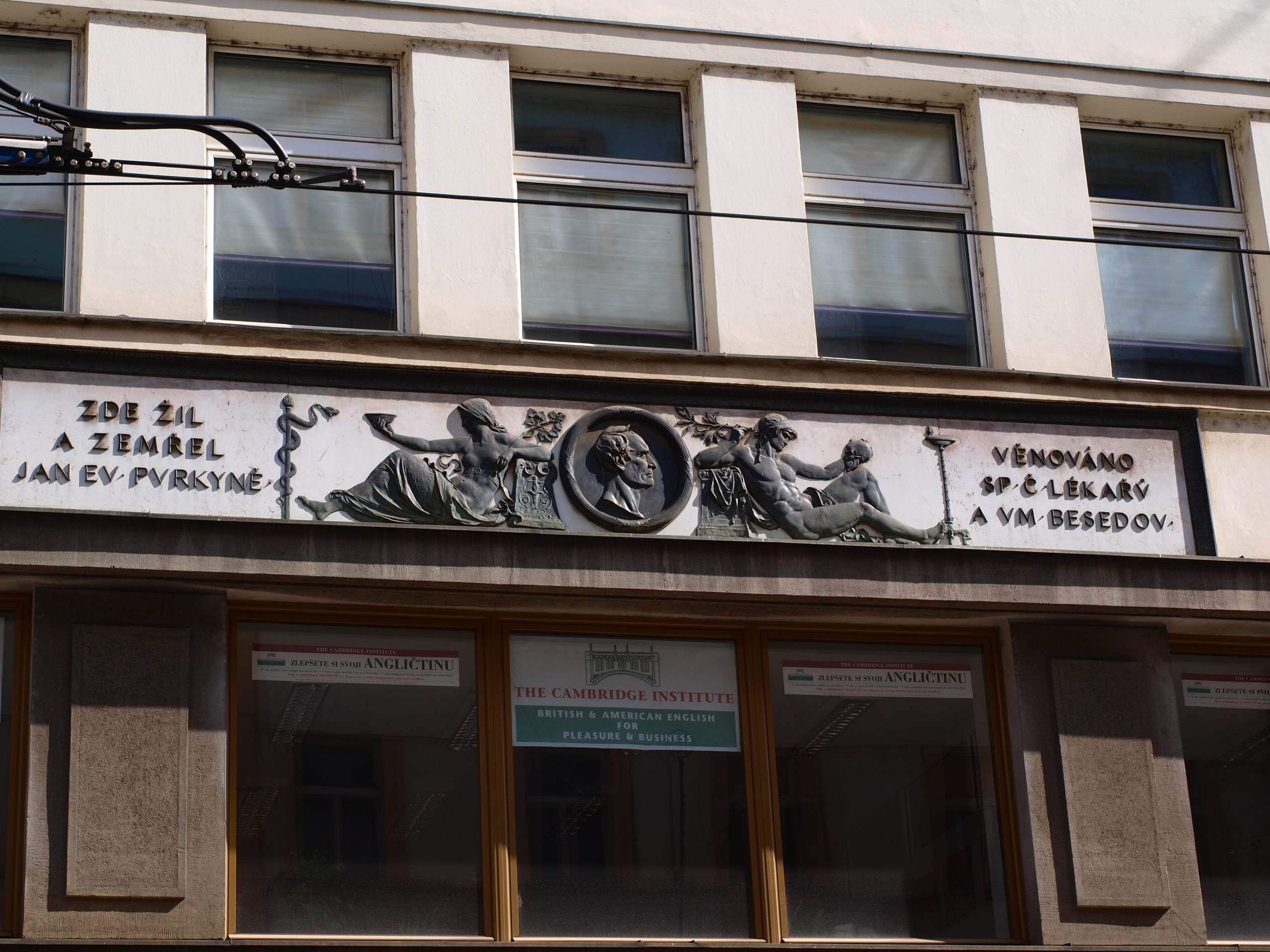 Palác Purkyňova